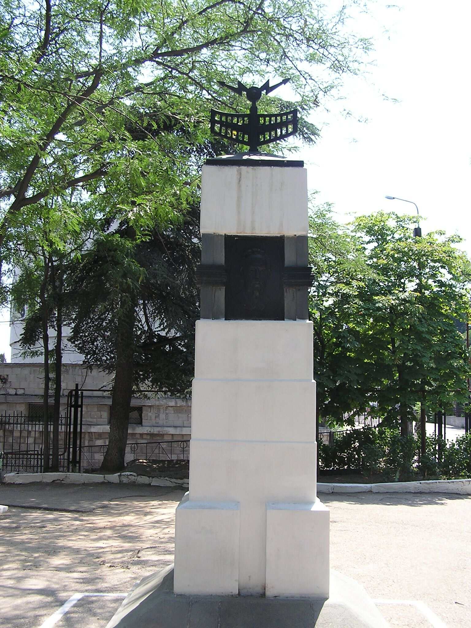 Севастополь. Памятник в честь столетия изобретения радио